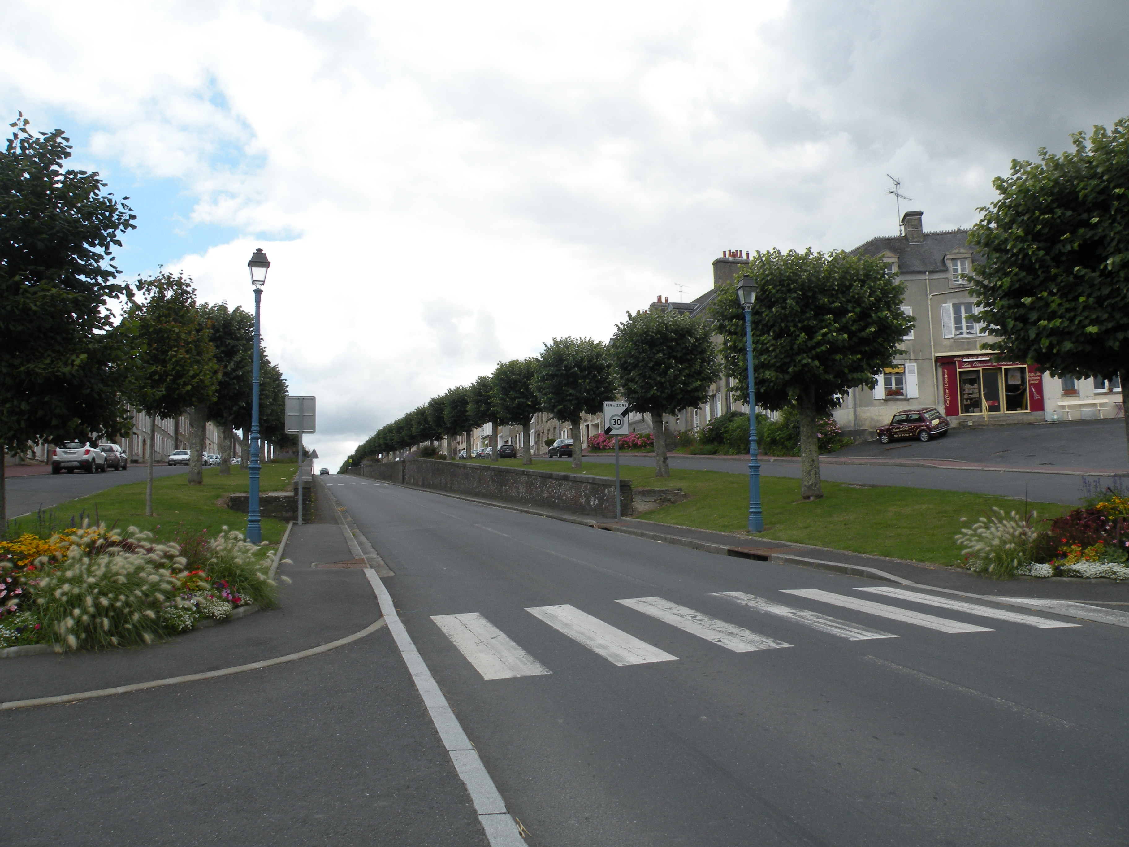 Balleroy rue